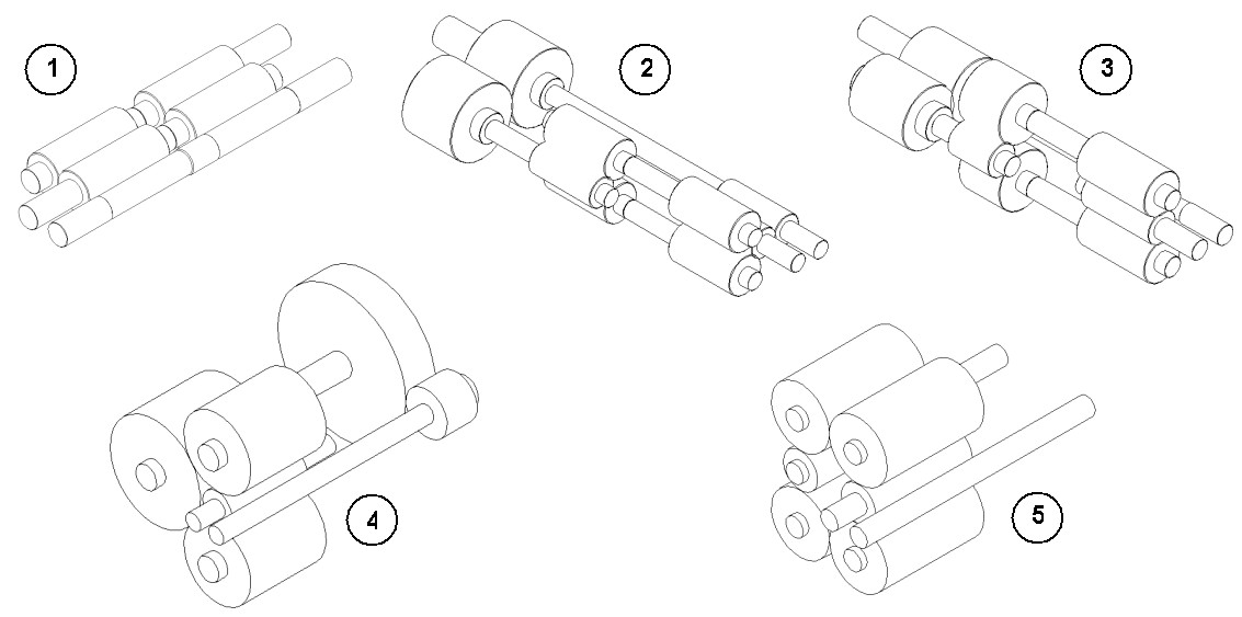 Prinzipien der Leistungsverzweigung für Extrudergetriebe: (1) 3-Wellen-Konzept wie bei Henschel DOS-V Getrieben; (2) und (3) 4-Wellen-Konzept; (4) 5-Wellen-Konzept; (5) 7-Wellen-Konzept